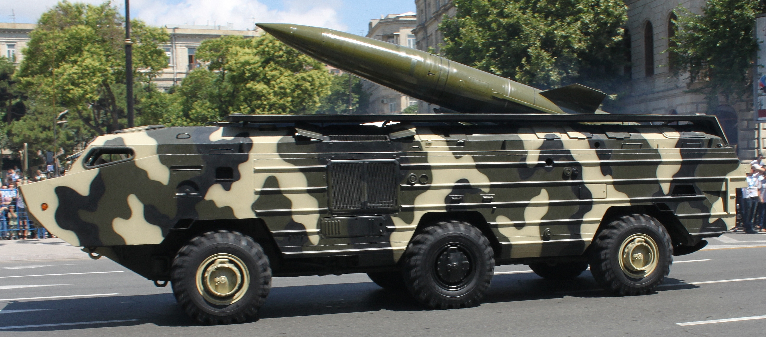 Военный парад в Баку в день вооруженных сил Азербайджана.